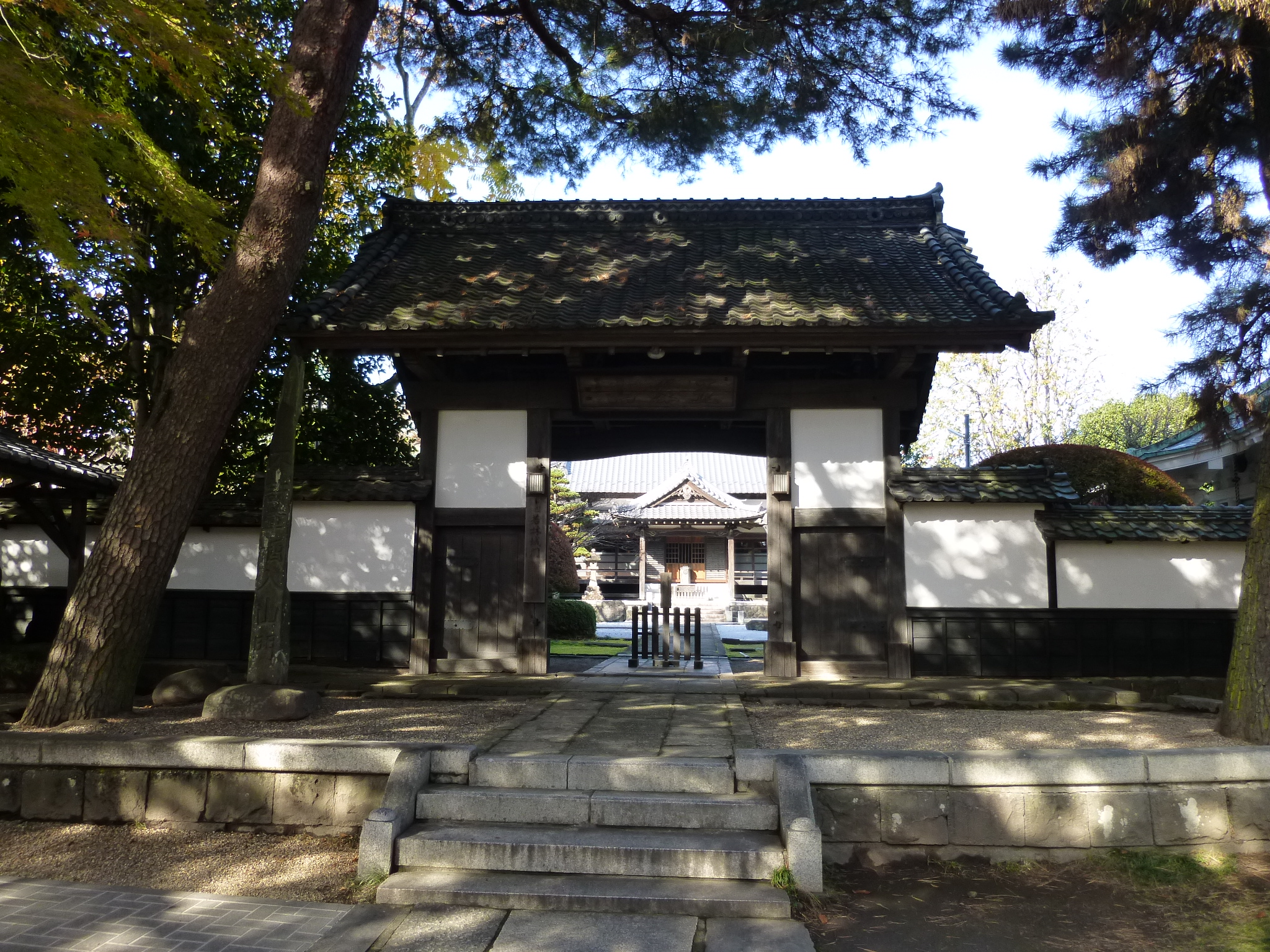 松音寺の山門。伊達政宗が晩年を過ごしたとされる若林城の正門と伝えられる。